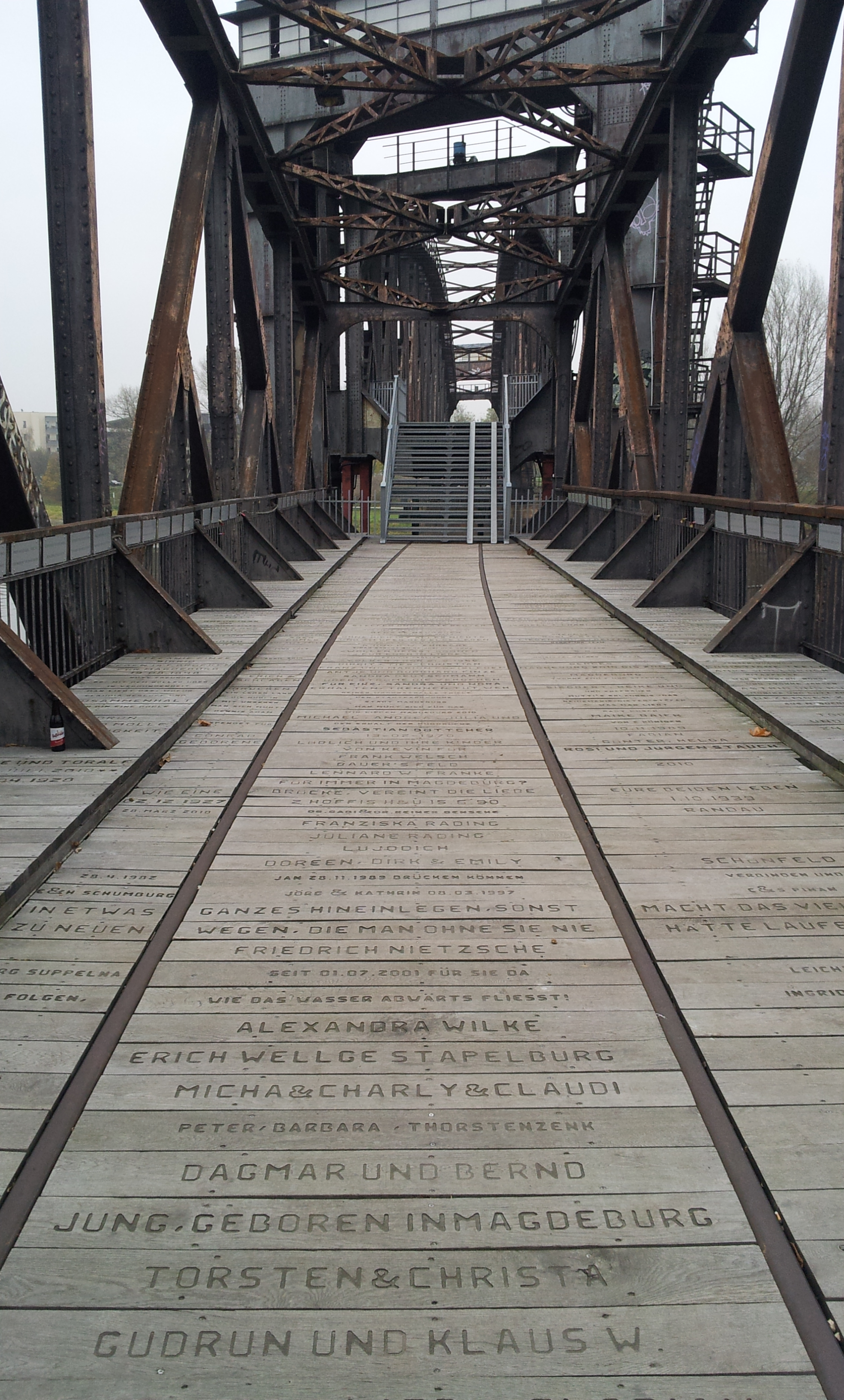 Aufgang zum beweglichen Teil der Hubbrücke Magdeburg (Elbe)